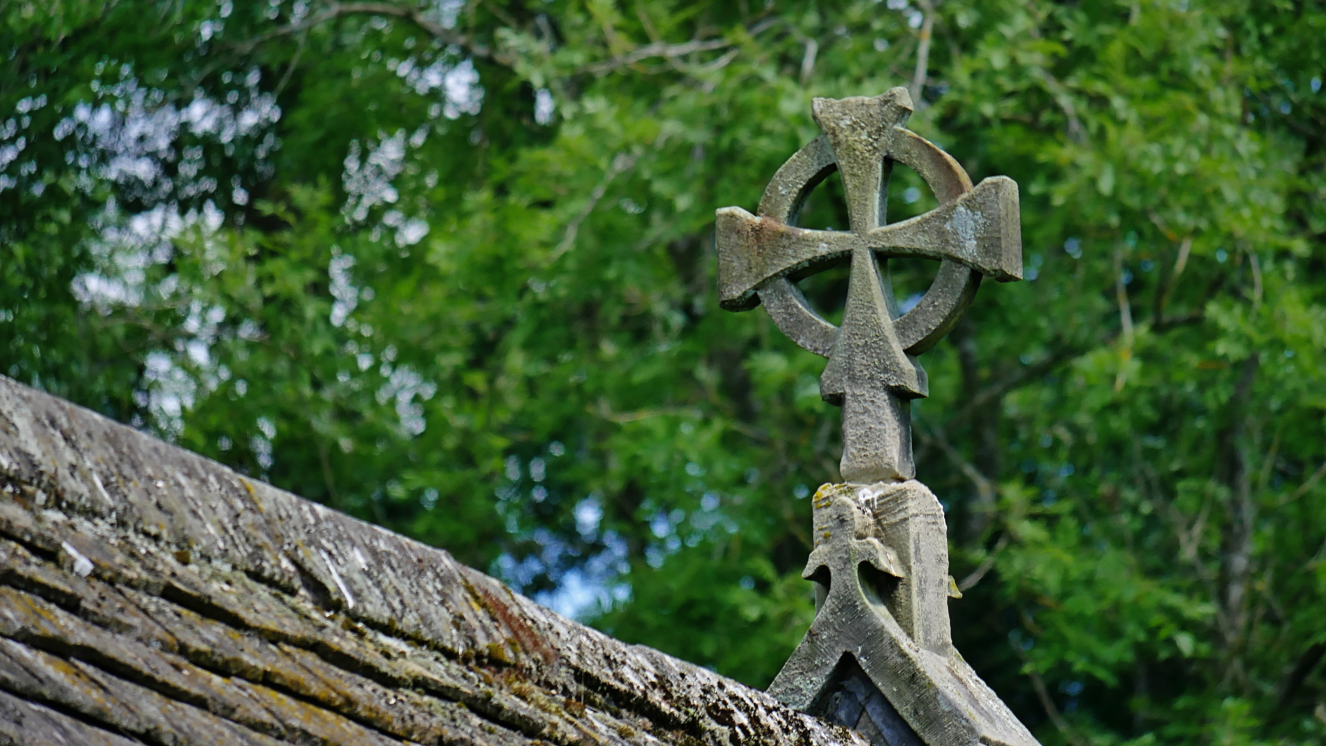 St Gregory's Minster, Kirkdale roof